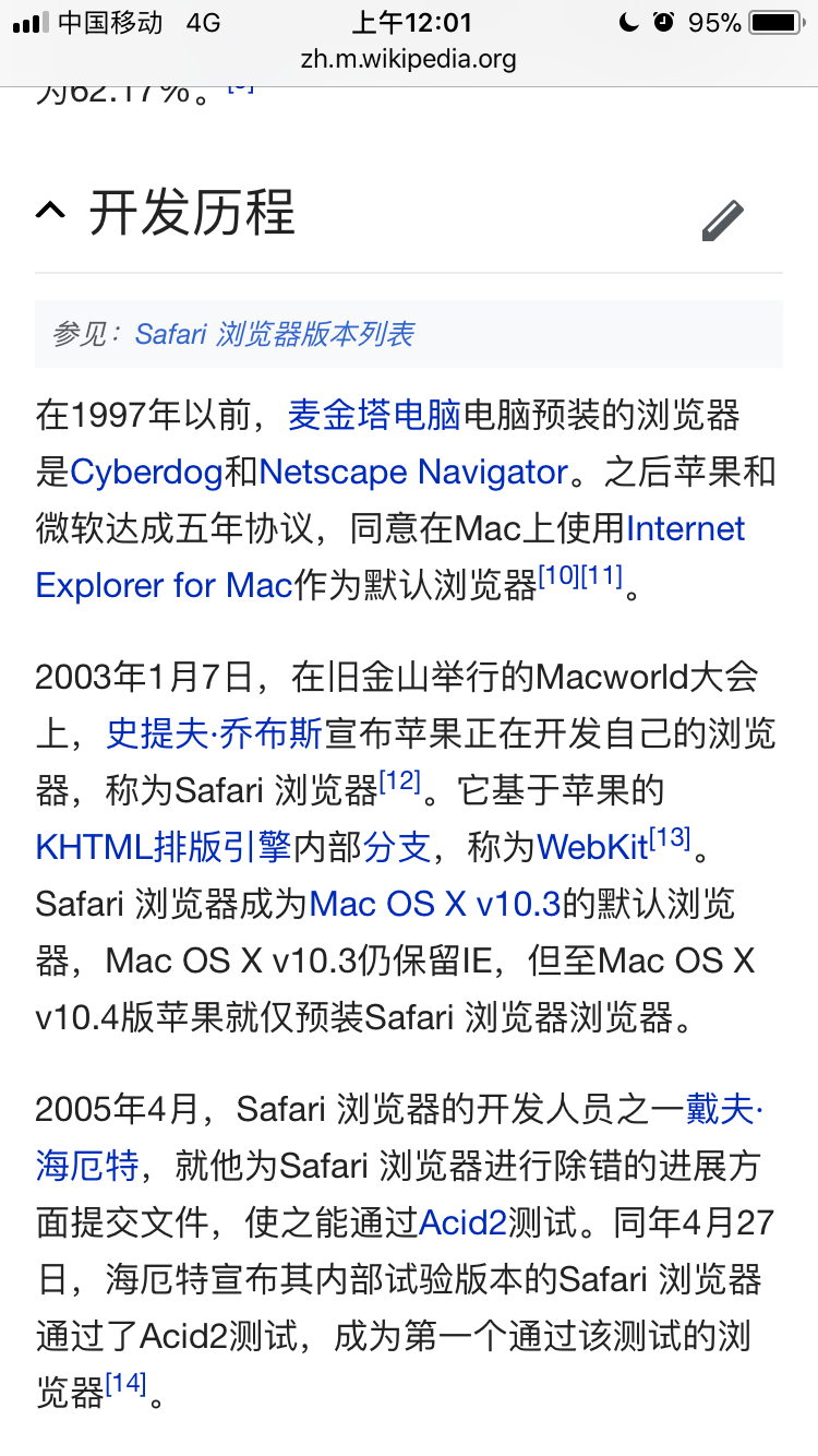 iOS11.2.2的Safari浏览器